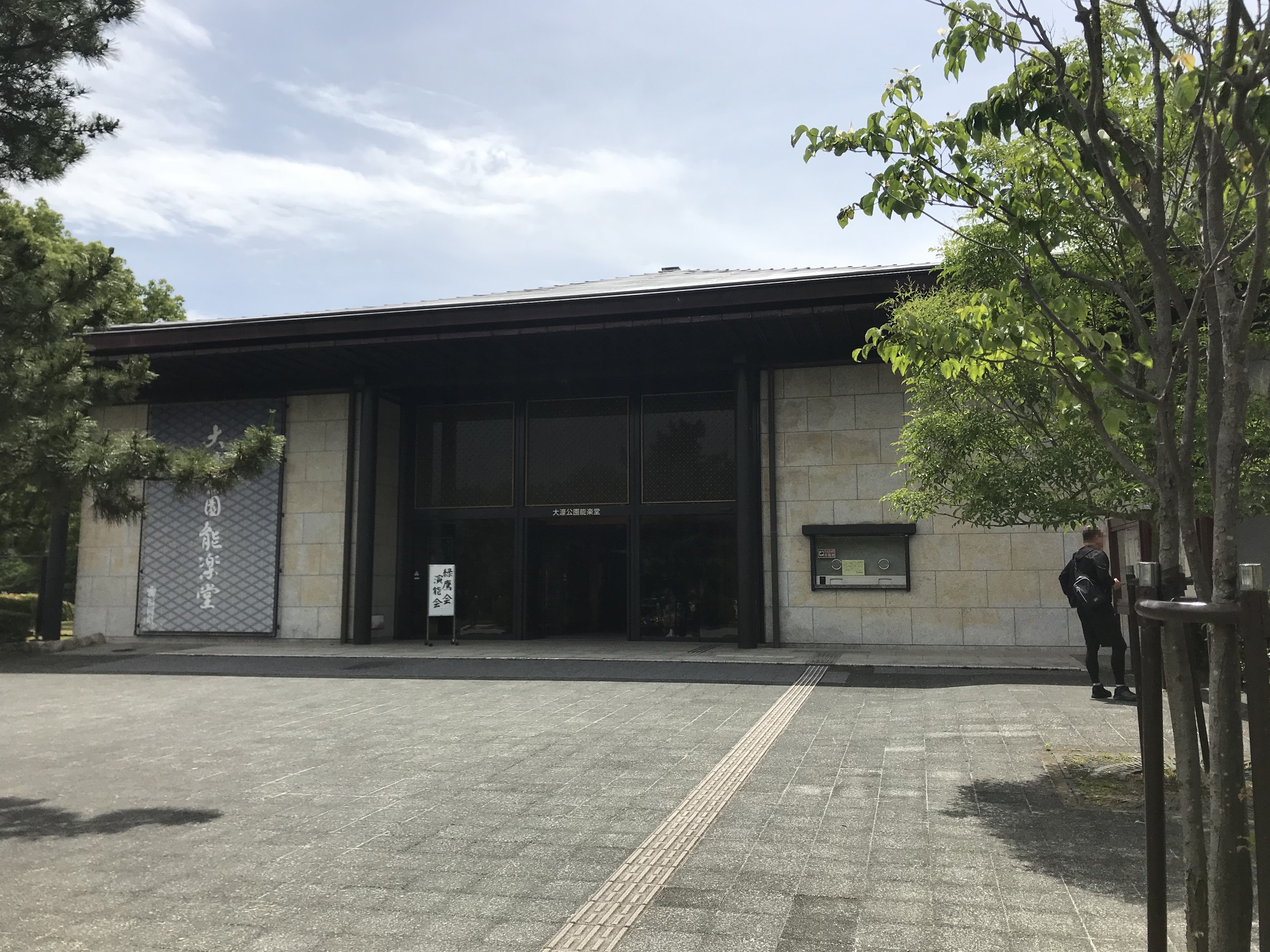 大濠公園の能楽堂